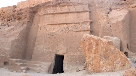 الصورة من تصويري الشخصي لمدائن شعيب عليه السلام الواقعة شمال المملكة العربية السعودية في منطقة تبوك بالقرب من مدينة البدع